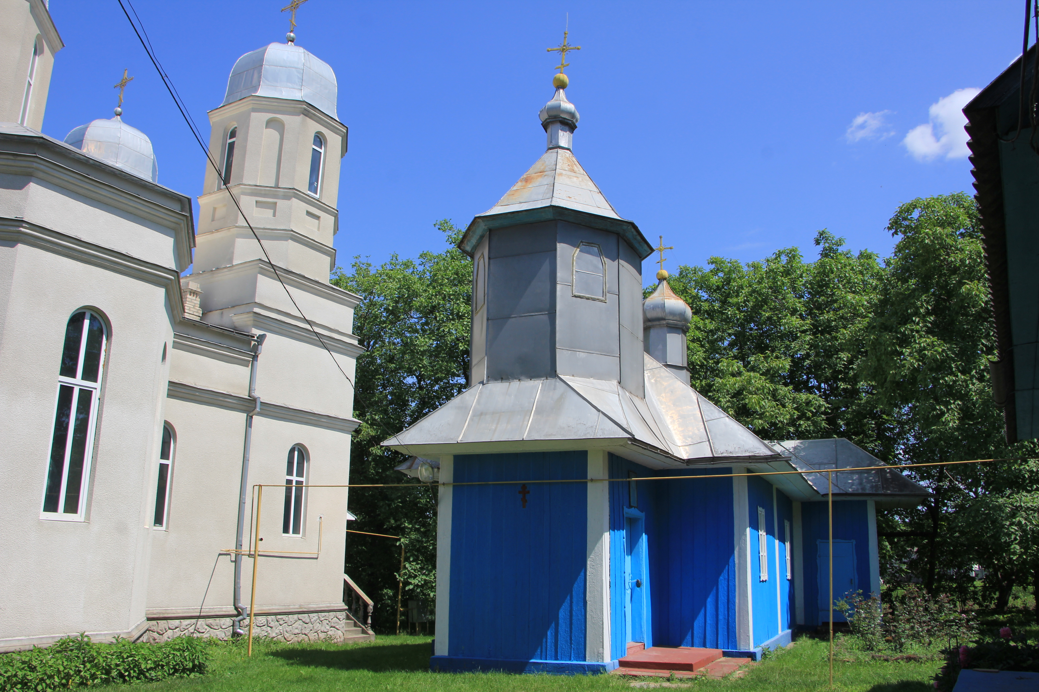 Церква Покрови Пр. Богородиці 1810 с. Круглик